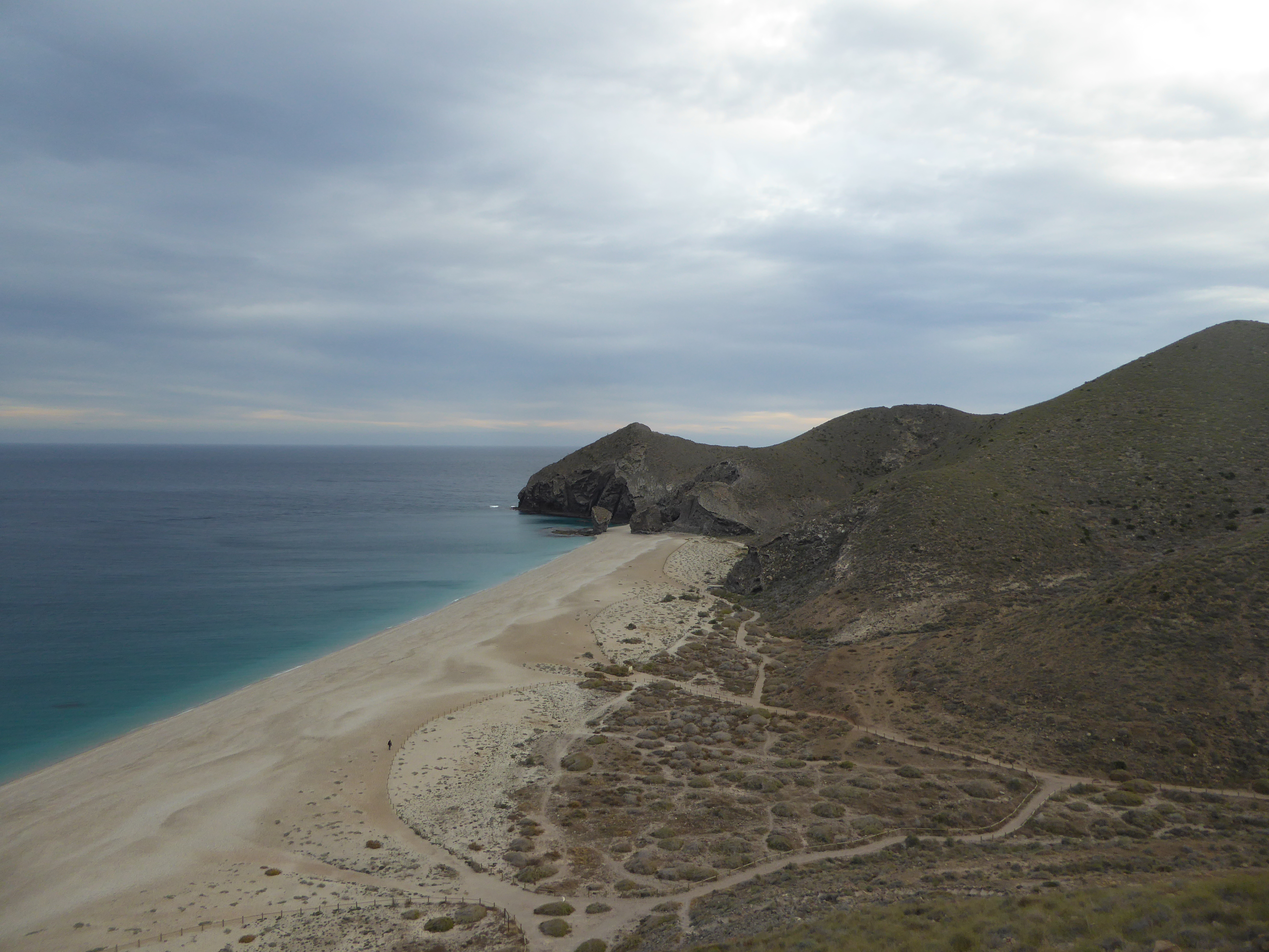 Playa de los Muertos en Carboneras, en el parque del Cabo de Gata - Níjar This is a photography of a Special Area of Conservation in Spain with the ID: ES0000046. Natura2000 entry, EEA entry